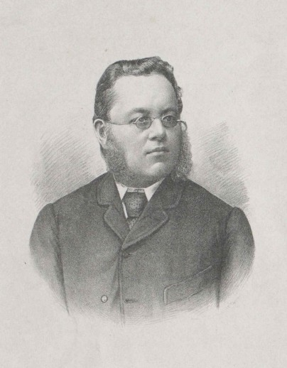 Anton Amand Paudler (1844 - 1905), Český římskokatolický duchovní, člen augustiniánského řádu a vlastivědec.